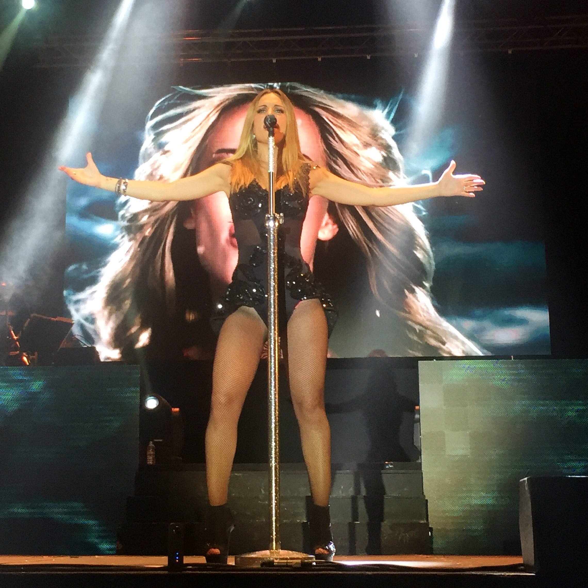 Edurne actuando en Terrassa, durante su gira Adrenalina